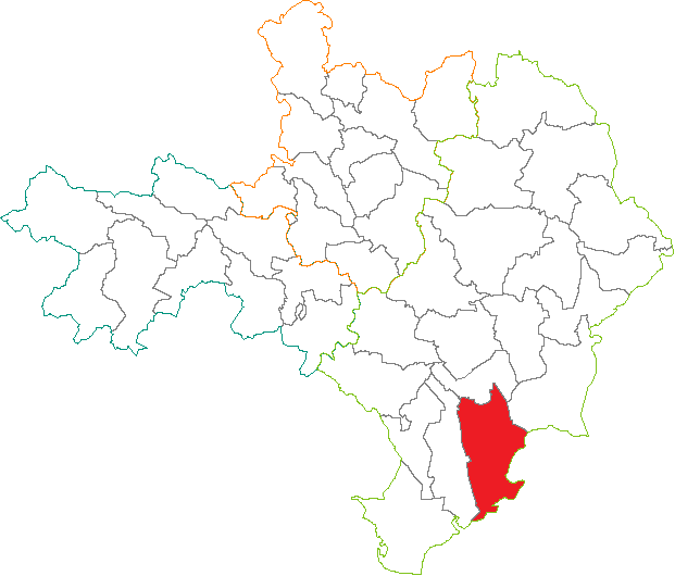 Situation du canton dans le département du Gard (France)